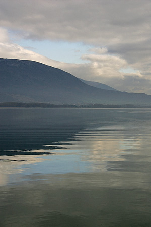 Yverdon: Morgenstimmung am Lac de Neuchâtel